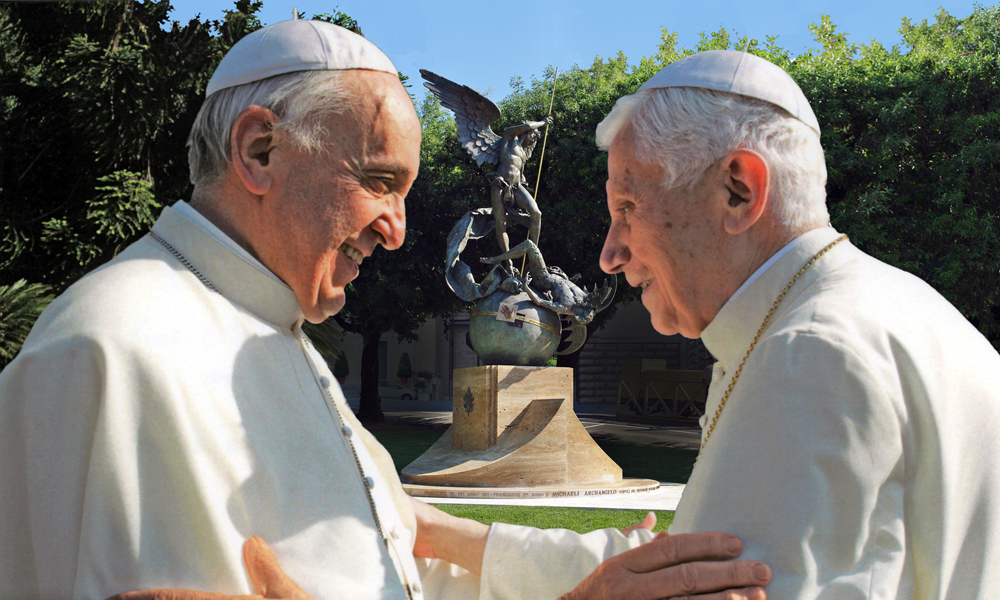 Incontro tra Papa Francesco e Papa Benedetto XVI in occasione dell'inaugurazione della statua di S. Michele Arcangelo nei Giardini Vaticani, opera dell'artista Giuseppe Antonio Lomuscio